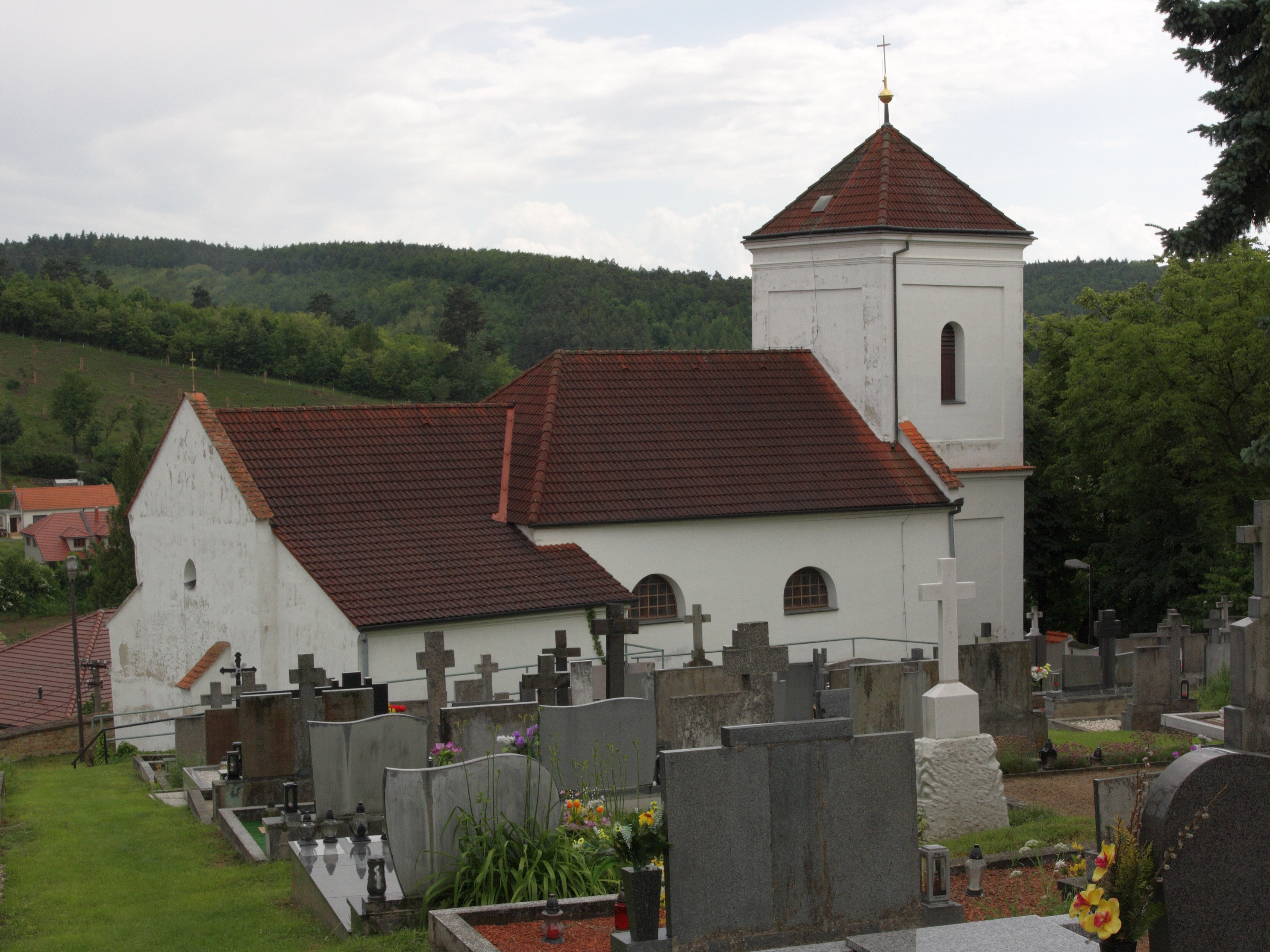 Lovčičky - kostel sv Václava.